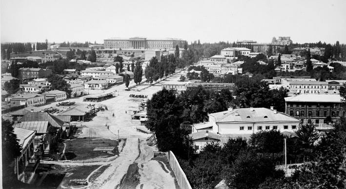 Бессарабка. На заднем плане - Киевский университет св. Владимира. Фотограф: Франц де Мезер.